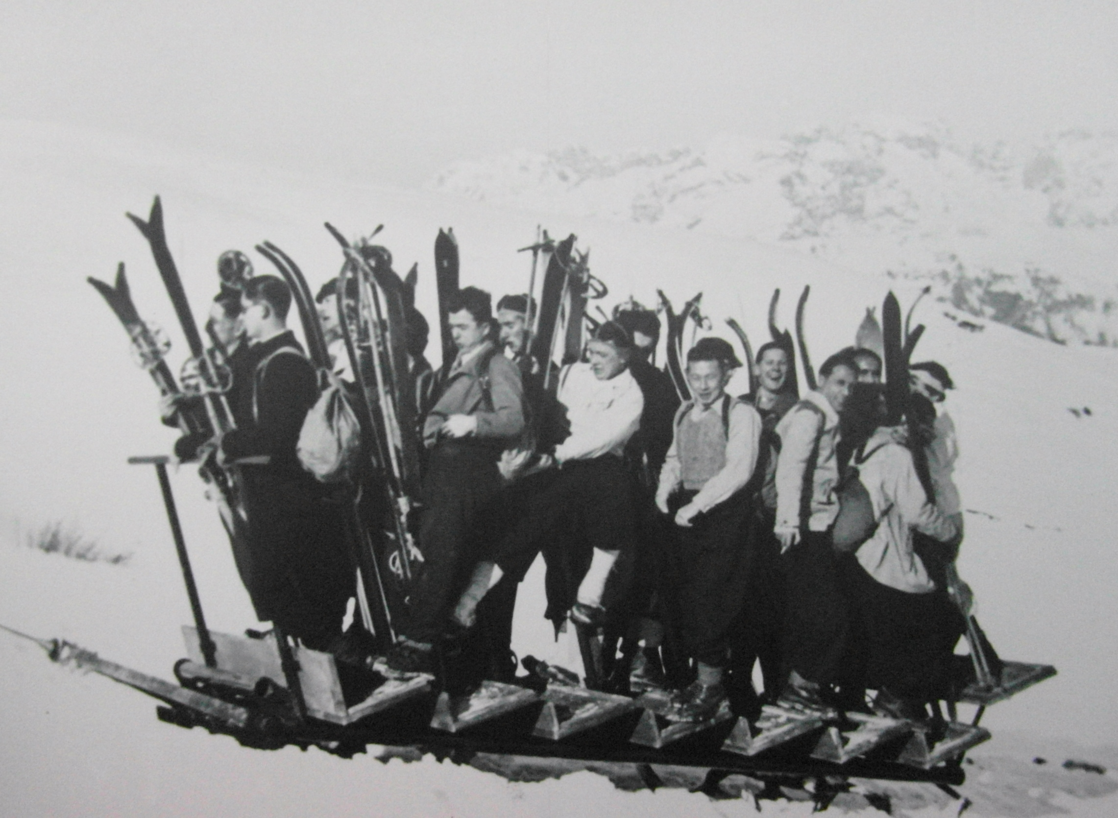 Prima slittovia in Europa sul Monte Bondone 1935